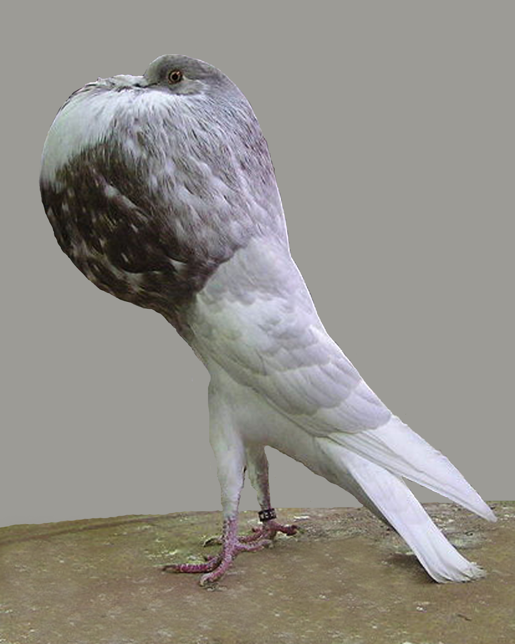 Norwich Cropper (Barless Mealie)